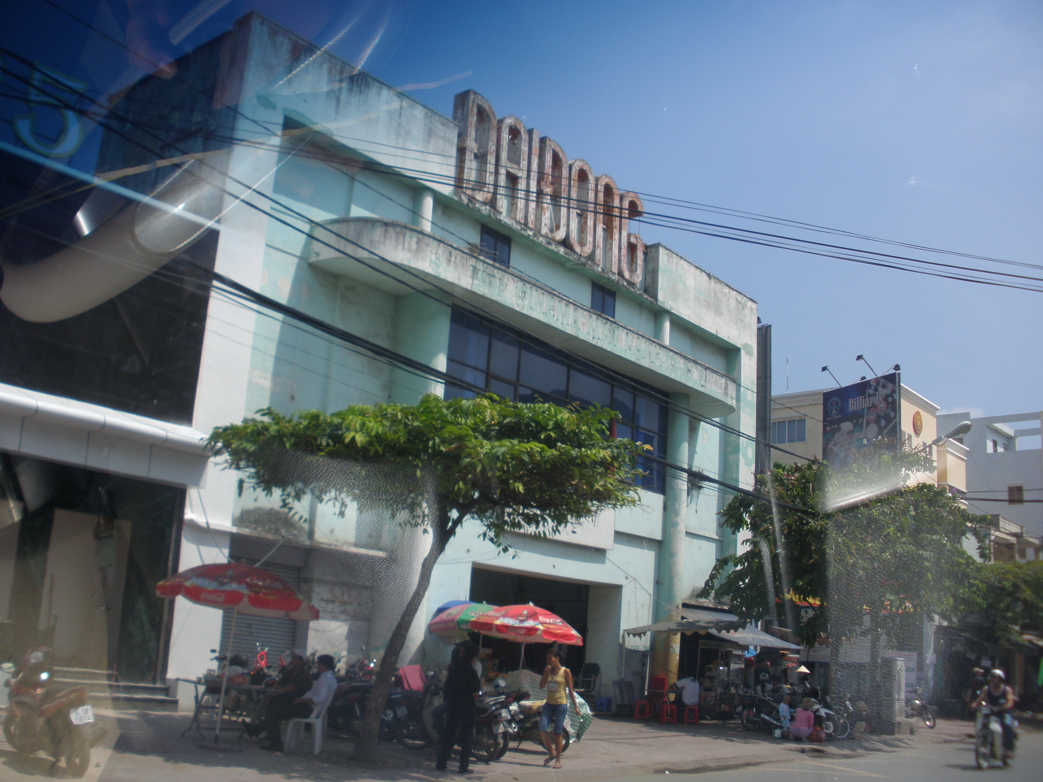 Đường Nơ Trang Long,Rạp Đại Đồng,quận Bình Thạnh,hcmvn